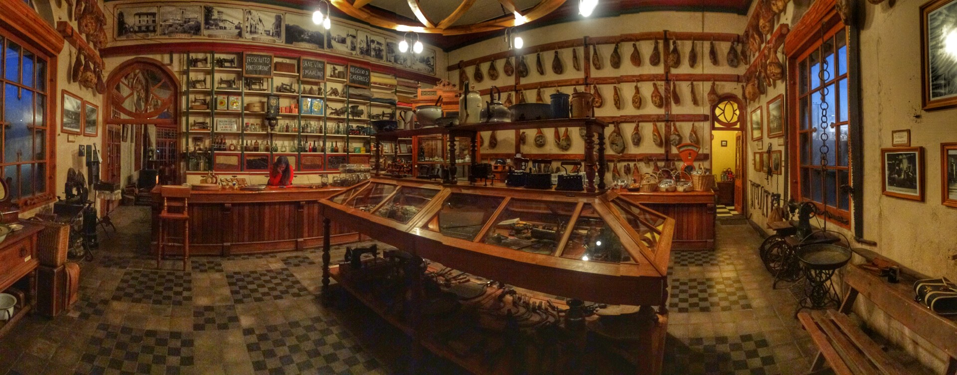 Montecorone I